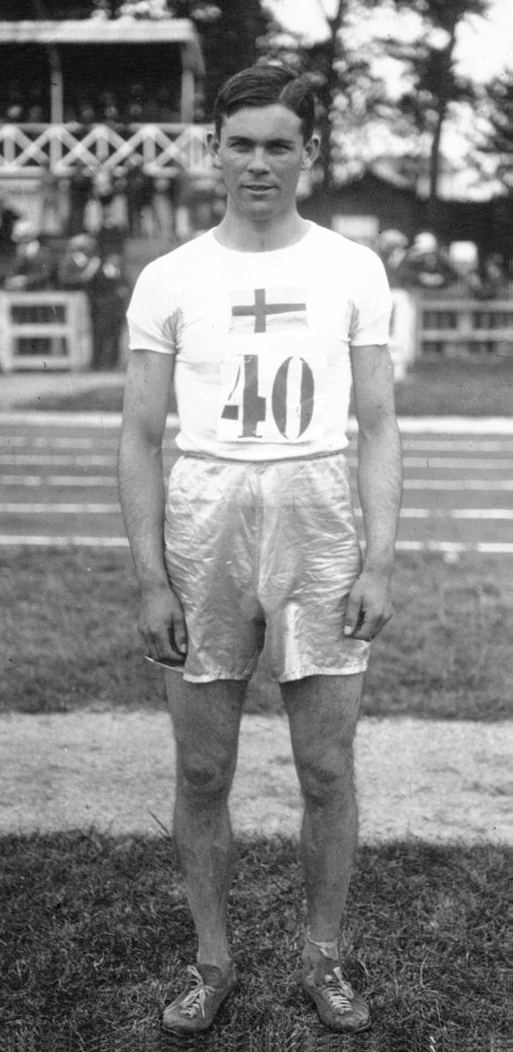 Abrahamson, Suédois : saut en longueur : [photographie de presse] / Agence Meurisse